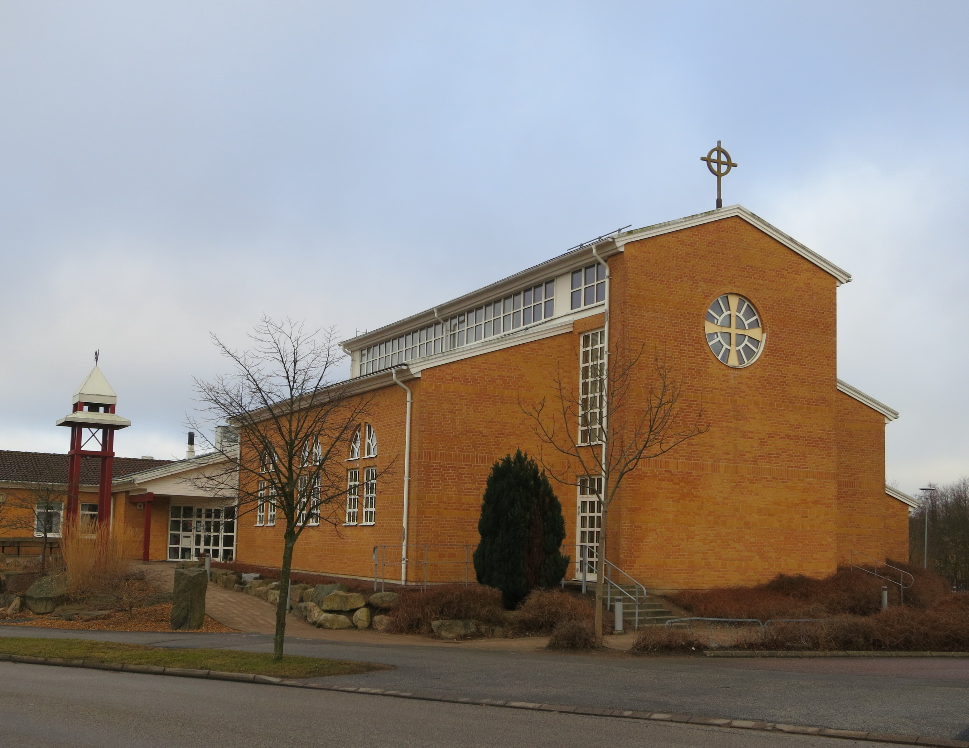 Maria Magdalena kyrka i Östra Torn, Lund